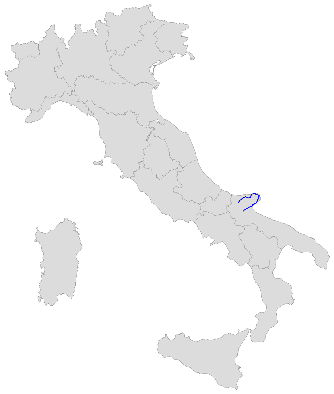 Percorso della SS 89 Garganica.